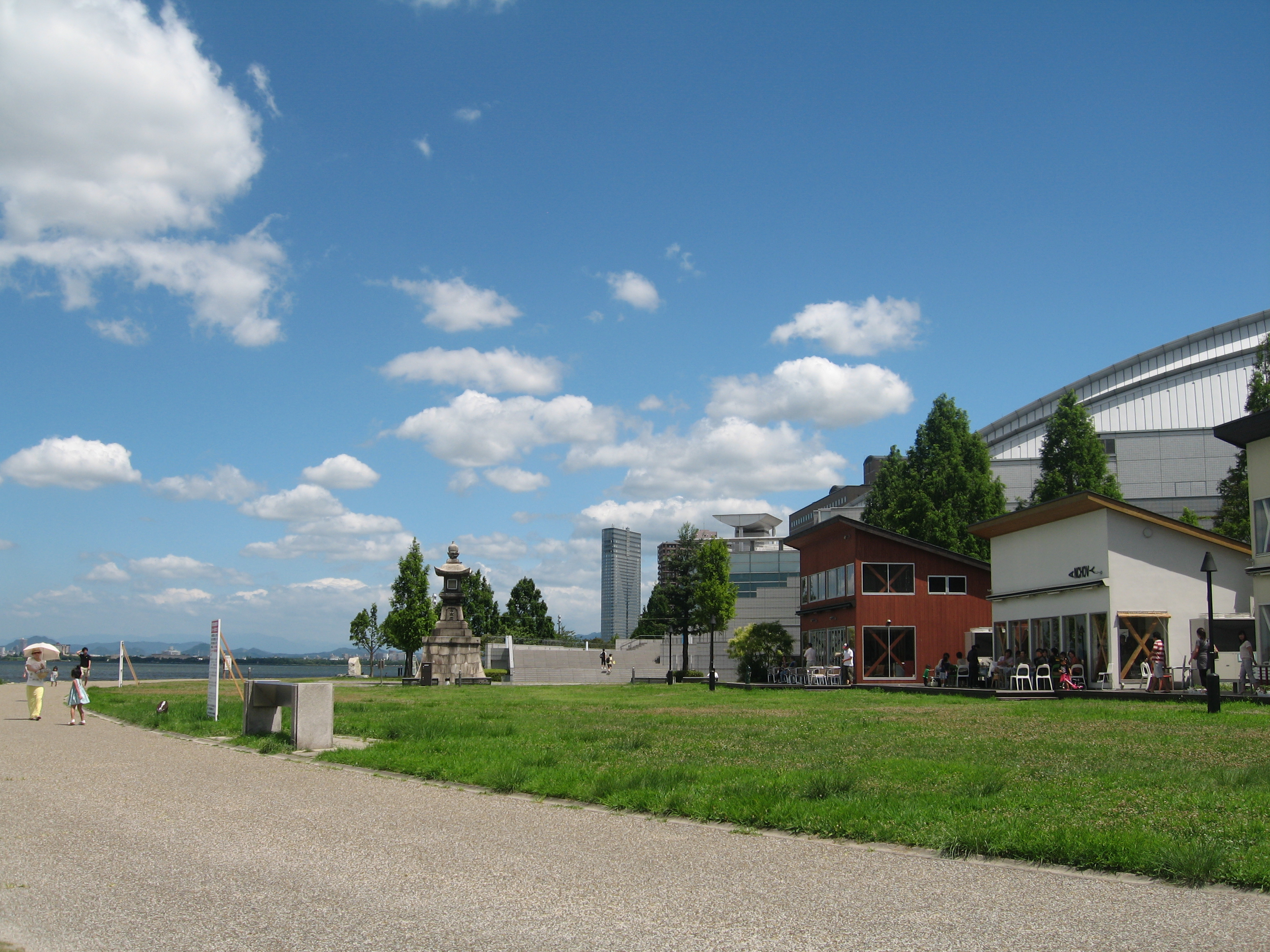 大津市なぎさ公園